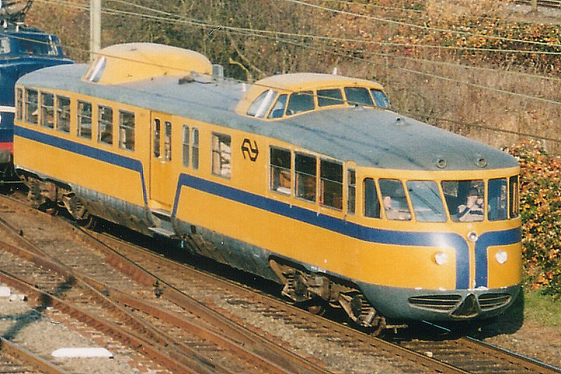 De Kameel 20 in de geel/blauwe kleurstelling